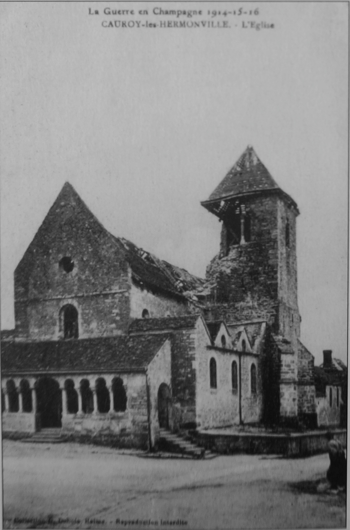 vue de cf titre.